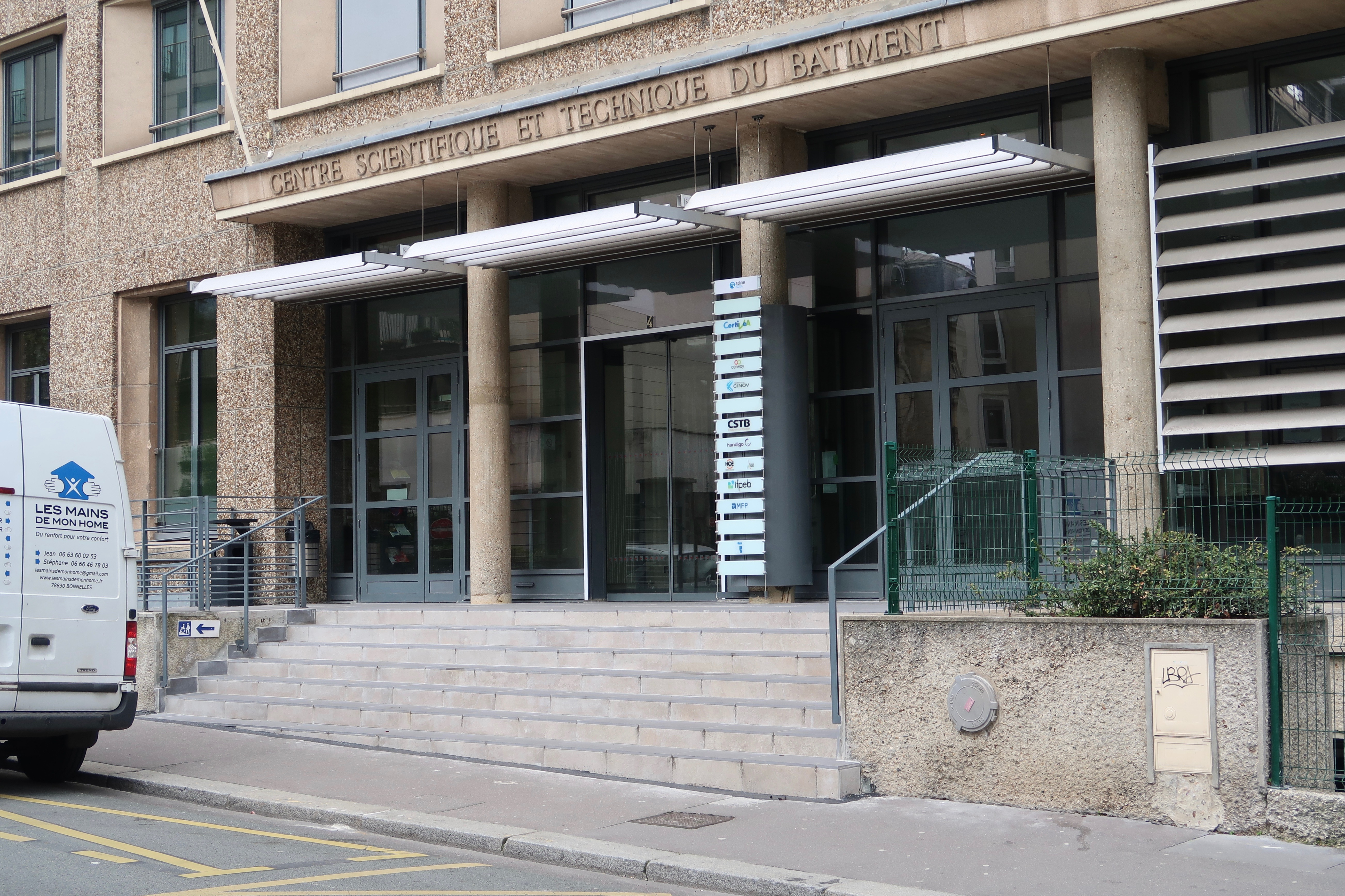 Centre scientifique et technique du bâtiment, 4 avenue du Recteur-Poincaré (Paris, 16e).